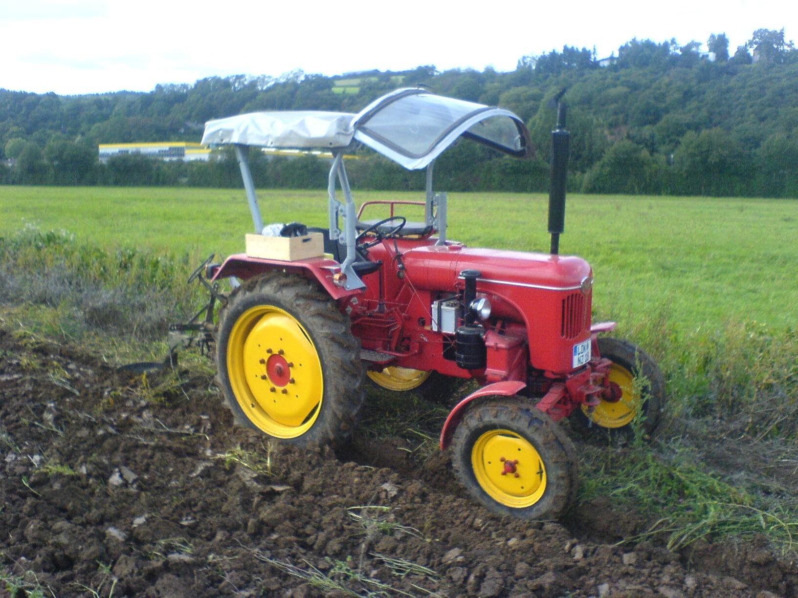 Normag-Traktor K18a mit Einschaar-Winkeldrehpflug in Deutschland